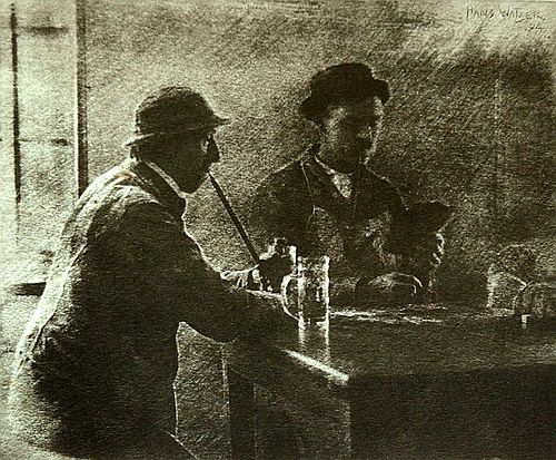 Hans Watzek Der Kiebitz [Die Kunst in der Photographie (Art Folio #1)] 1897